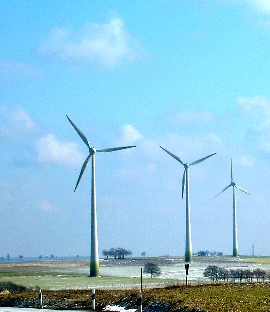 Eoliennes vun Heischent.